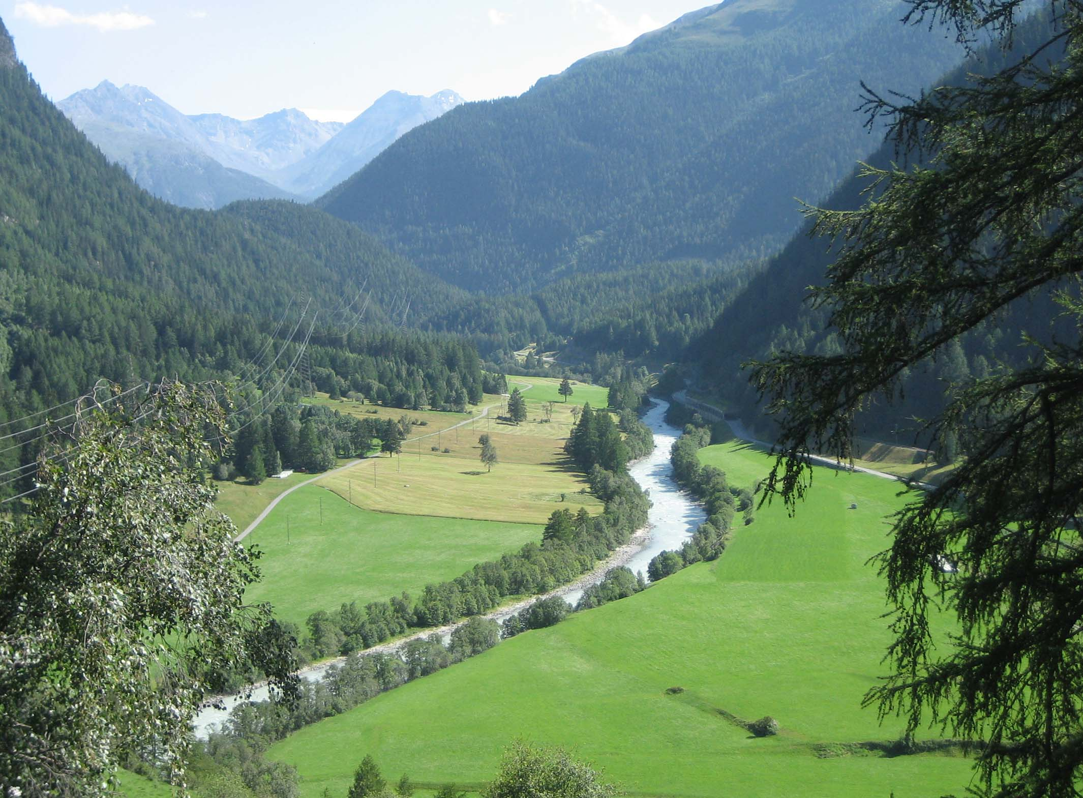 Der Inn bei Susch, talaufwärts